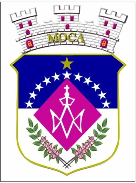 Este es el escudo del municipio (pueblo) de Moca, Puerto Rico (Estados Unidos)